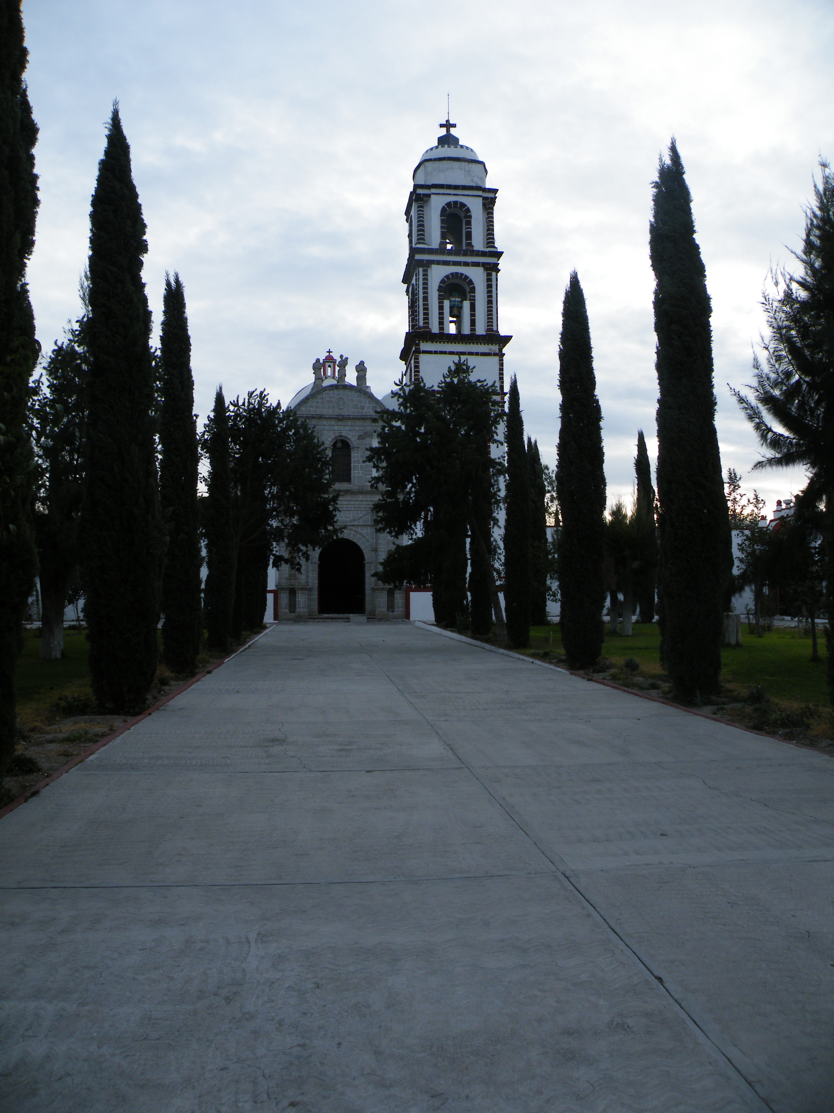 Tuxagni near Lagunilla, Hidalgo